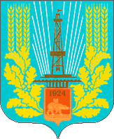 Герб Чернушинского района, разработанный во времена СССР